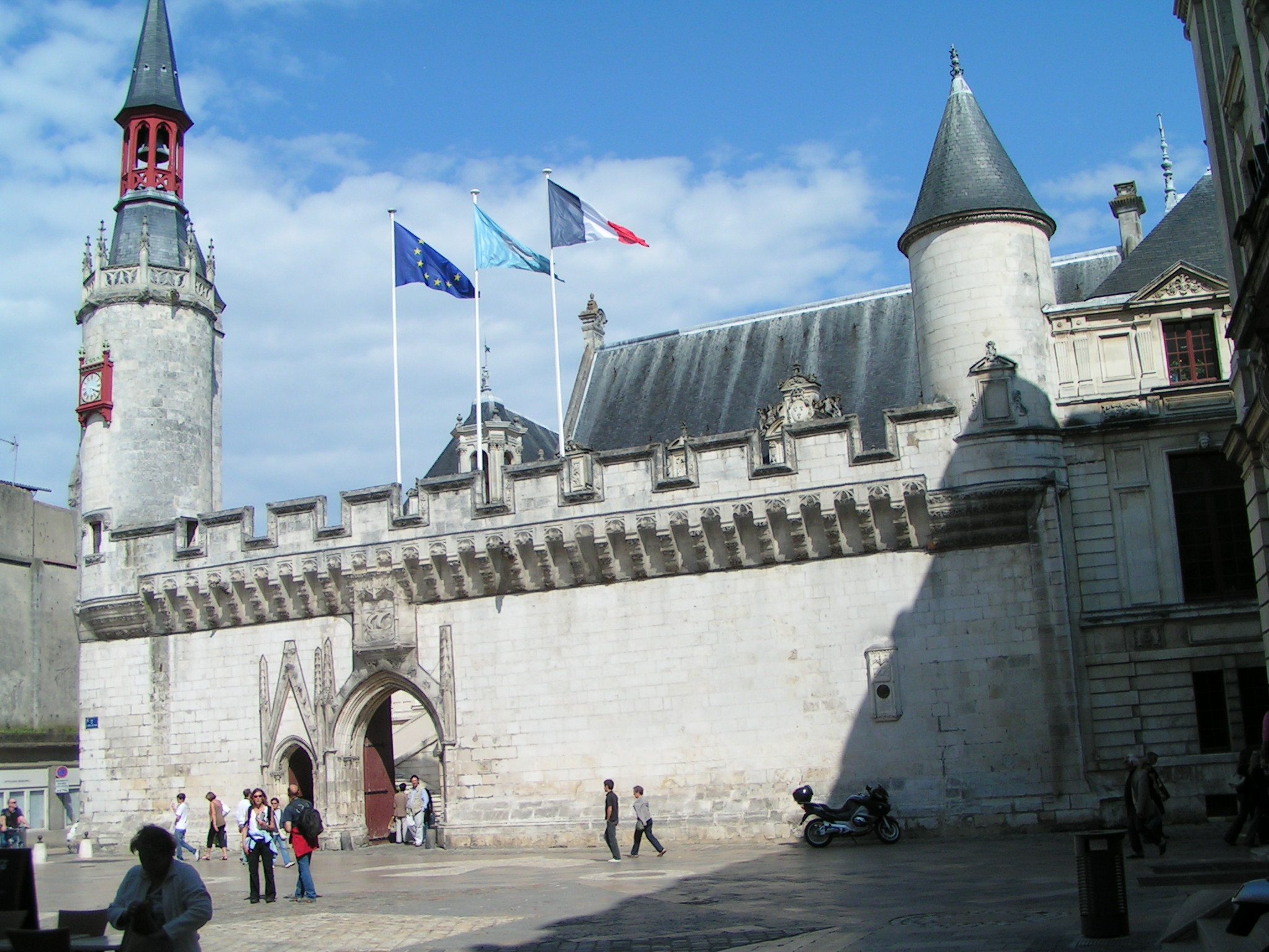 Mairie de La Rochelle